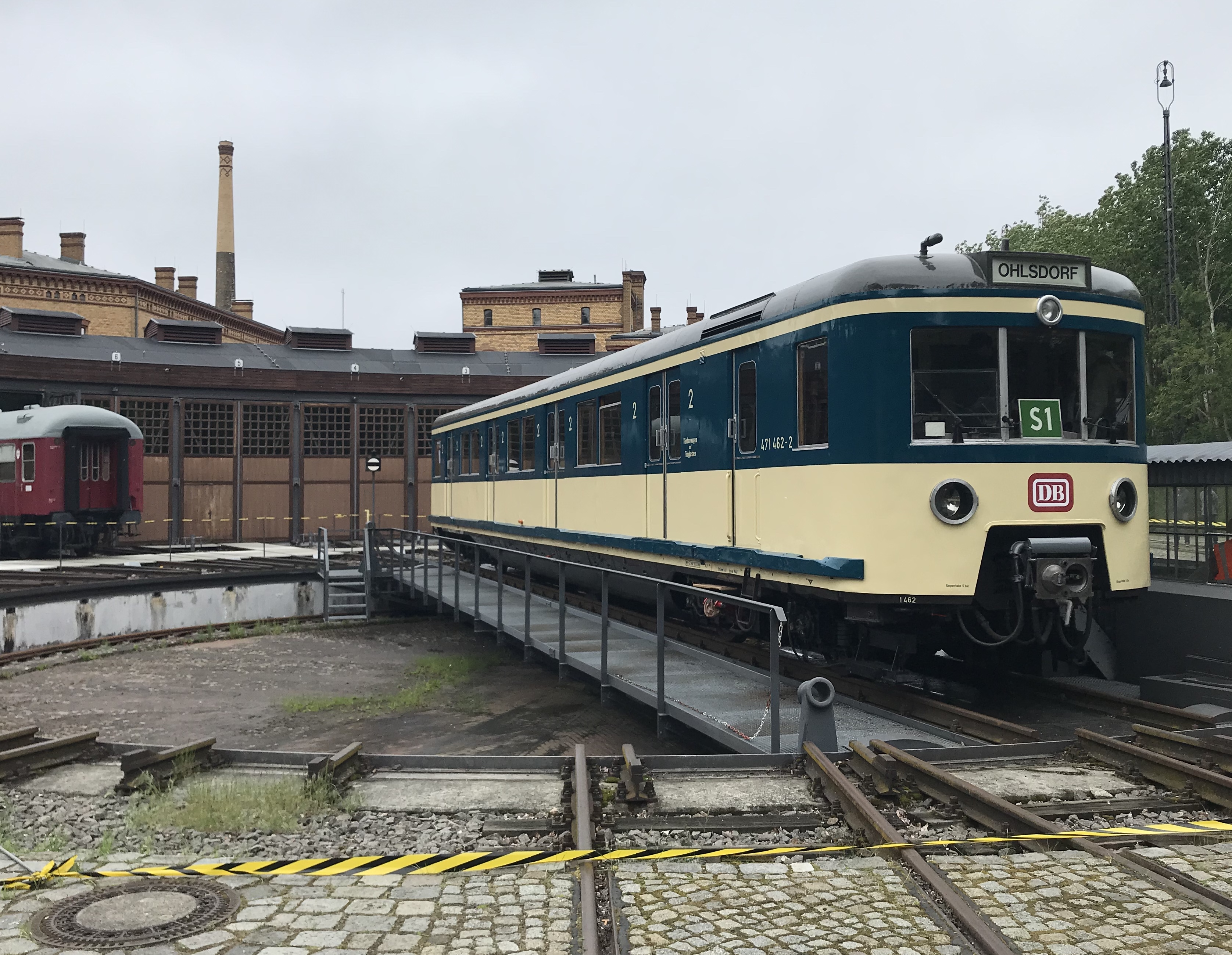 Triebwagen 471 462 (Baujahr 1954) der Hamburger S-Bahn bei der Ankunft im Deutschen Technikmuseum Berlin am 22. Mai 2019.